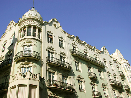 Casa Sagnier, Valencia, Spain.